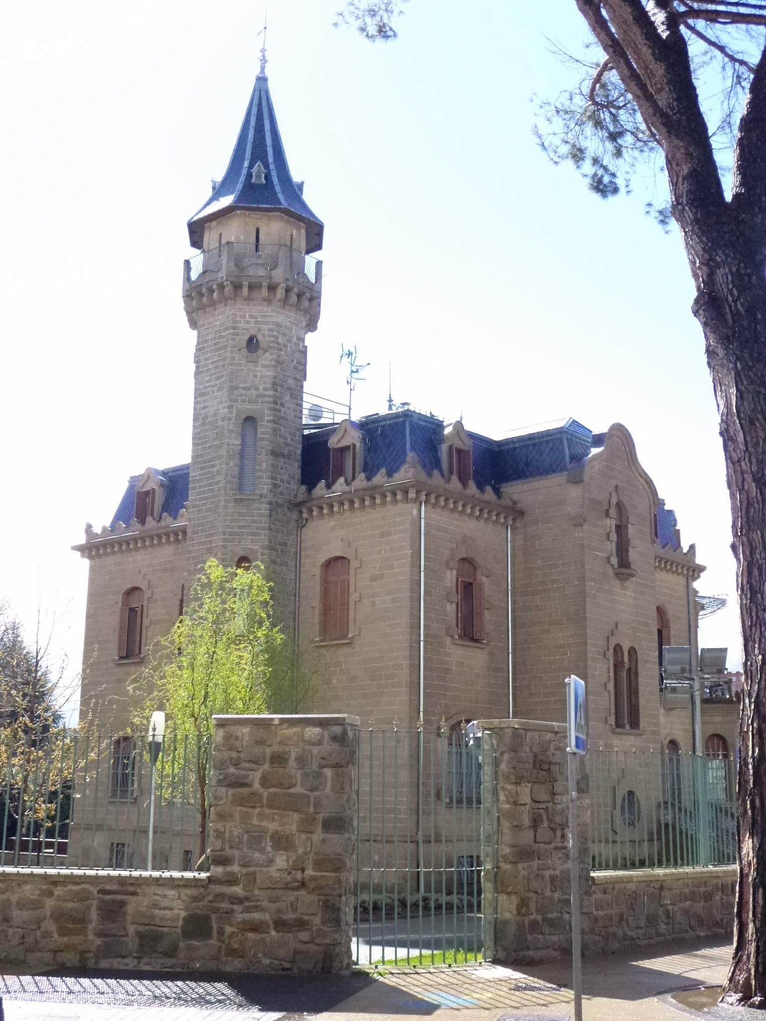 Palacete de Burlada (Burlada, Navarra)